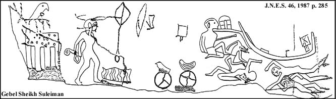 Grafite da Batalha de Gebel Sheikh Suleiman.